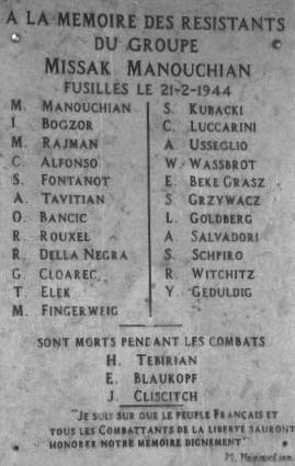 Photographie du mémorial de l'affiche rouge à Valenciennes Valence.